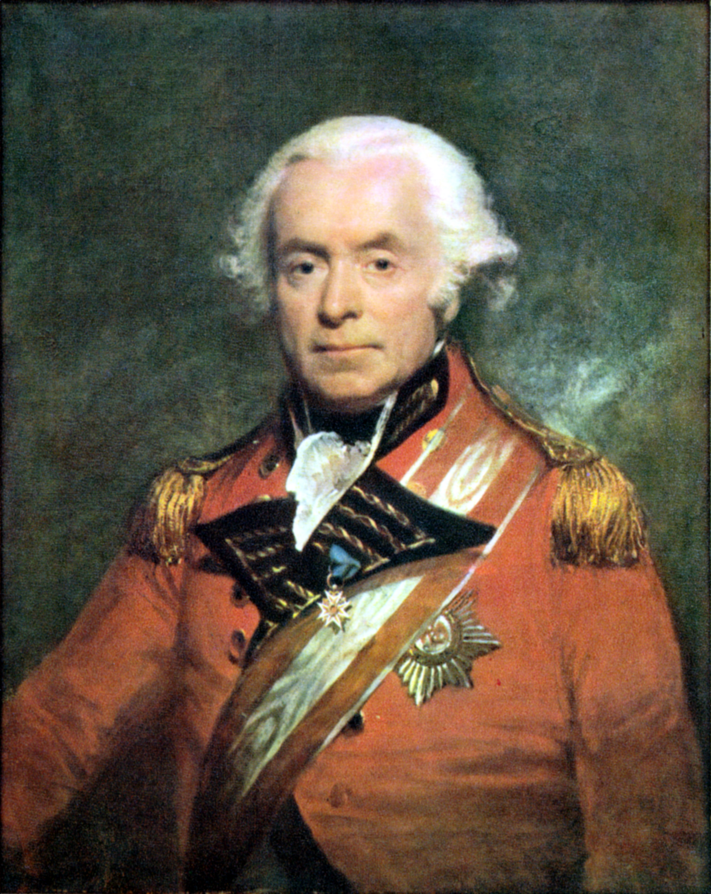 Generalleutnant Charles-Daniel de Meuron (1738-1806). Oberst und Inhaber des Schweizerregiments de Meuron in britischen Diensten. Er trägt die Auszeichnungen des Militärverdienstkreuzes und das Grosskreuz des preussischen Rotenadlerordens